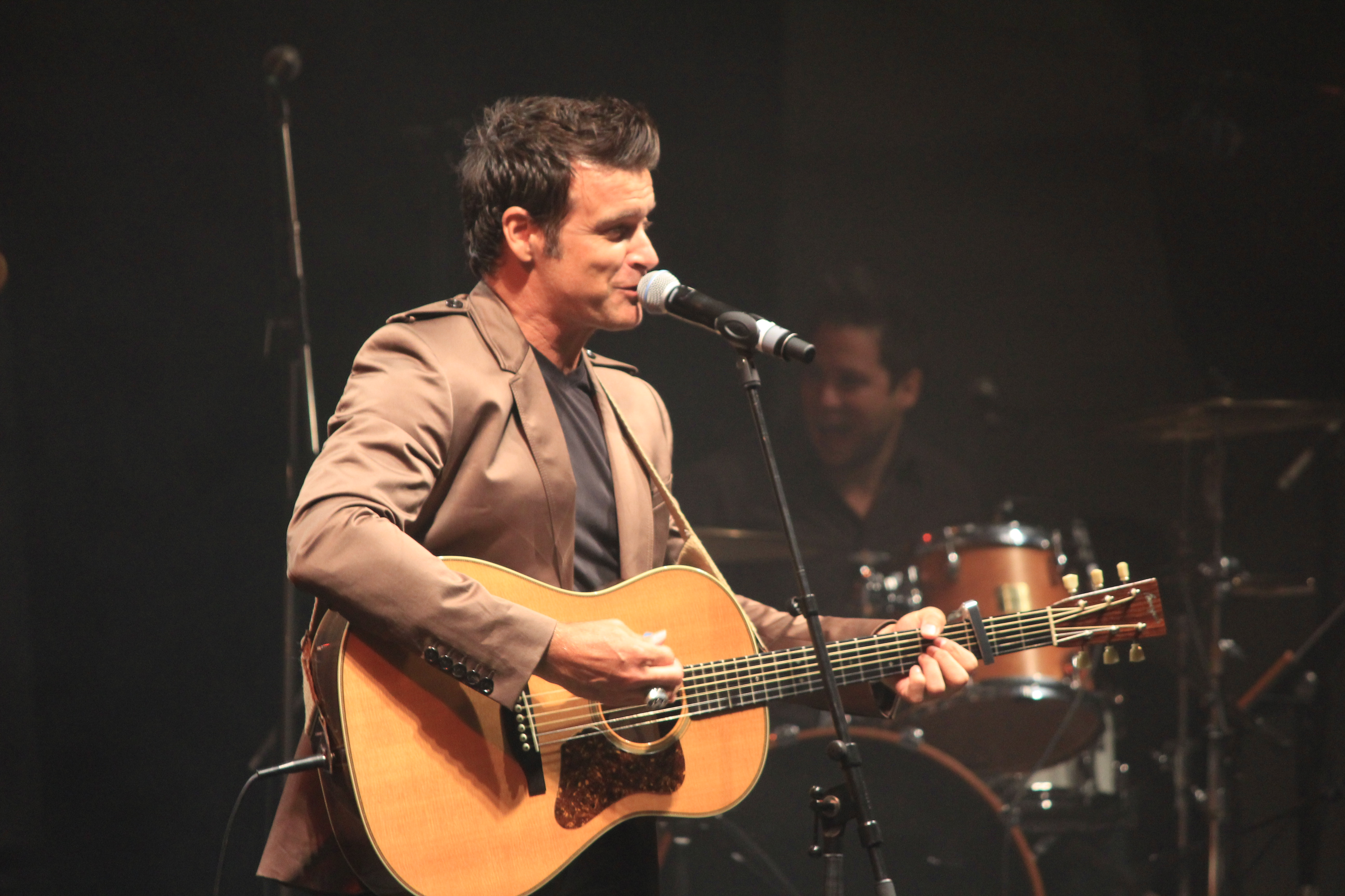 Roch Voisine lors de la soirée acadienne organisée dans le cadre du festival interceltique de Lorient 2012.